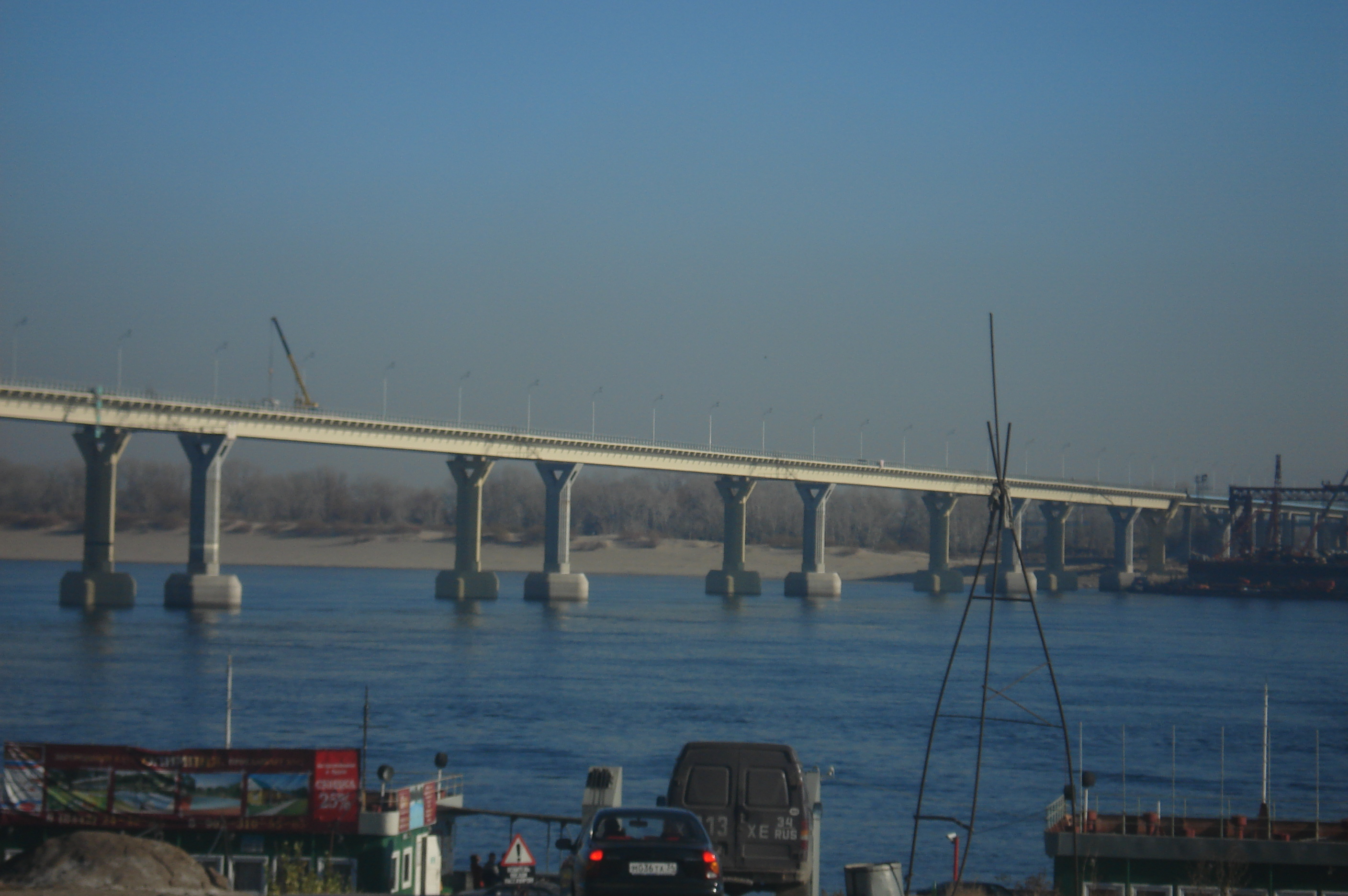 Волгоградский мост 11 ноября 2008